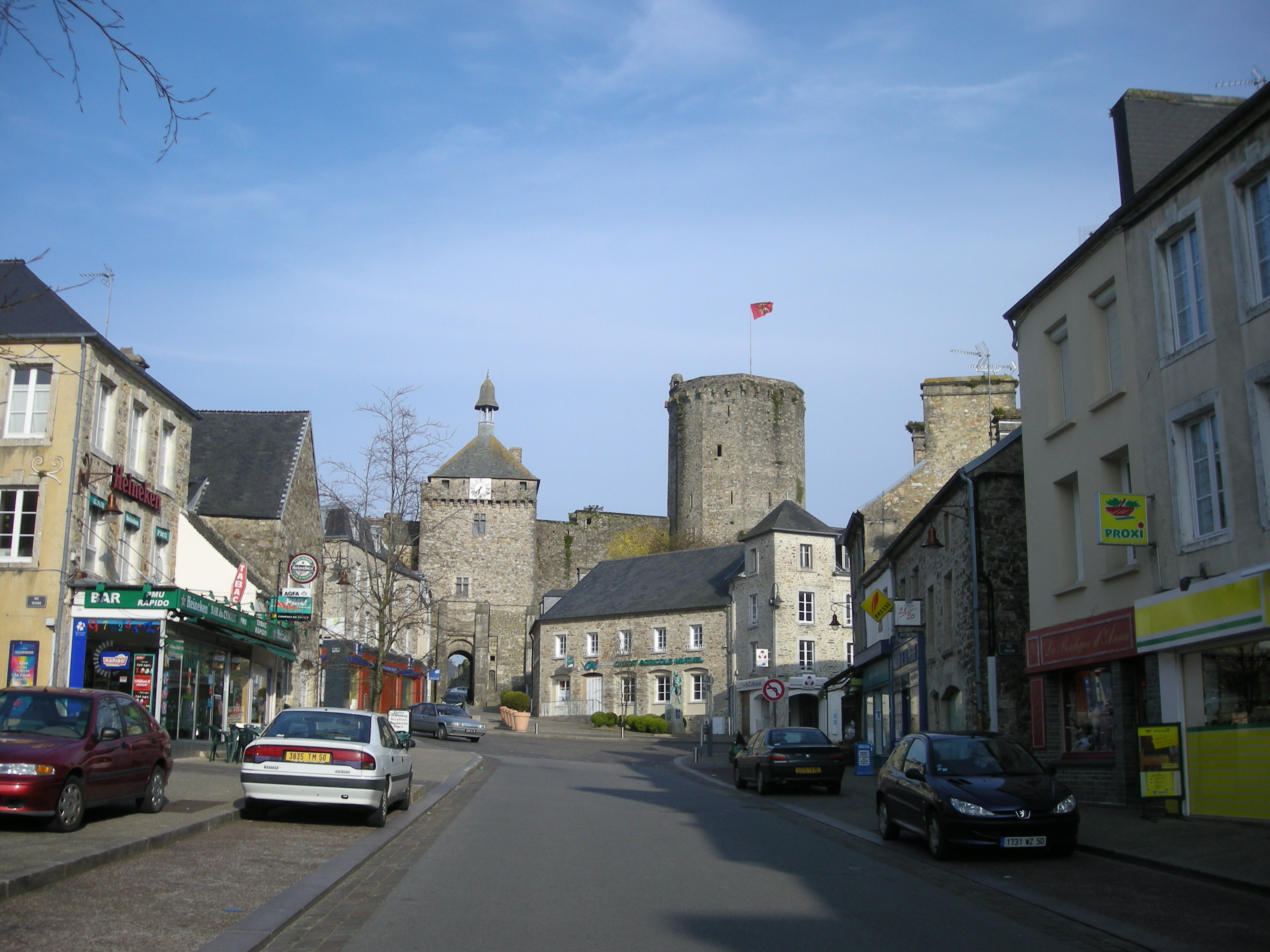 Rue de Bricquebec (Manche, Normandie, France)